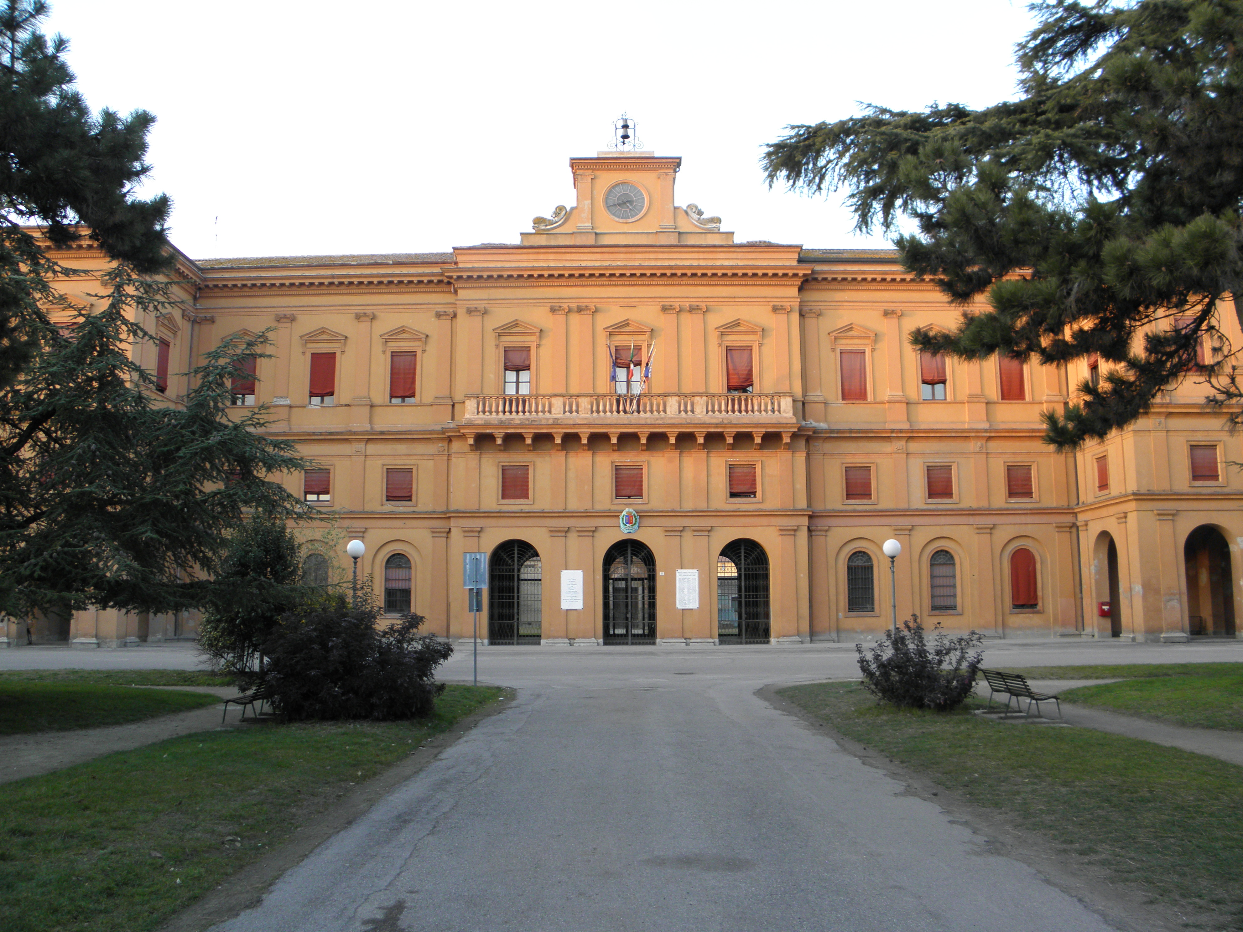 Copparo, Piazzetta Mosè Tomasatti: vista della facciata del palazzo municipale.